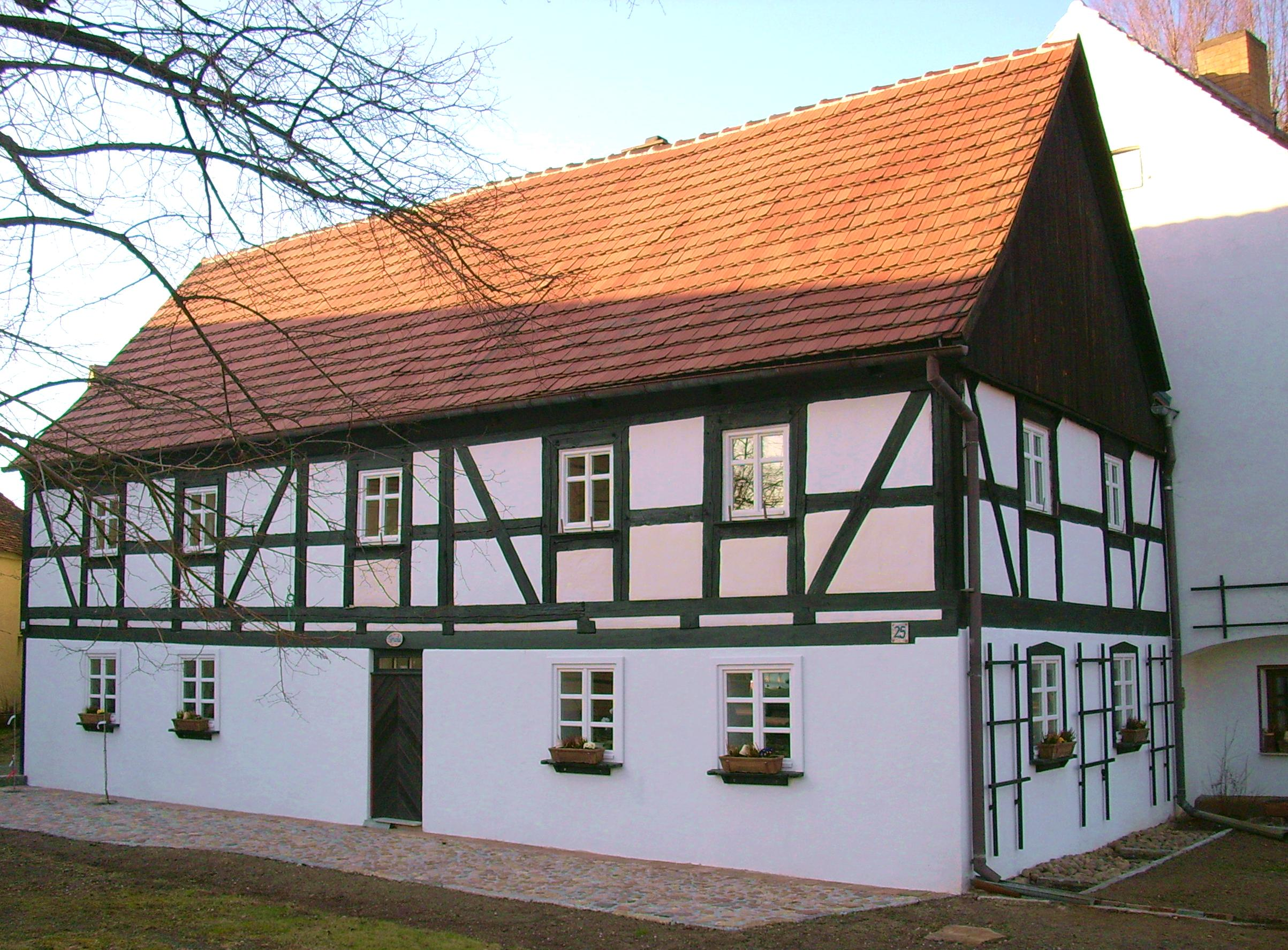 Gaststätte, Am Elstergrund 25 in Dörgenhausen, Ortsteil von Hoyerswerda Hornjoserbsce: 2=Hosćenc w Němcach pola Wojerec.